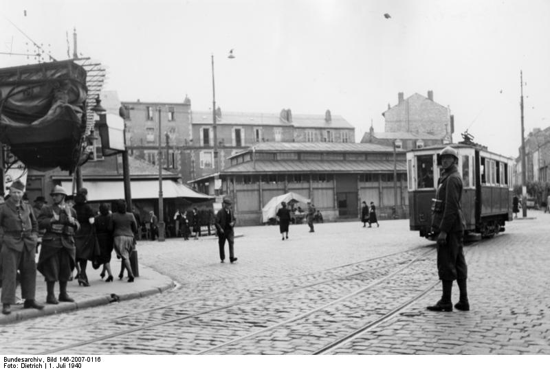 Prop.-Kp. 612 Ort: Limoges, Datum: 1.7.40 Jenseits der Demarkationslinie regeln franz. Soldaten der Verkehr.